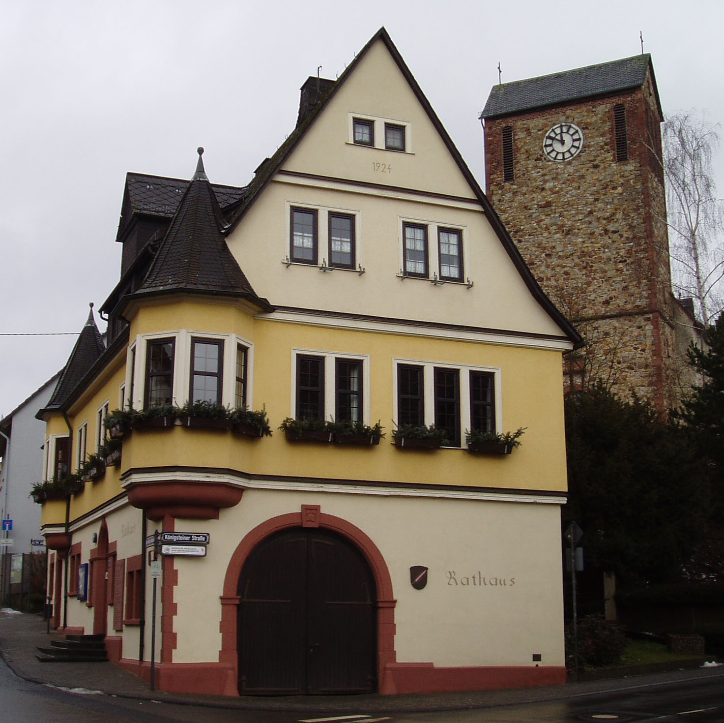 Rathaus und St. Michaels-Kirche von Oberjosbach, Gemeinde Niedernhausen im Taunus.